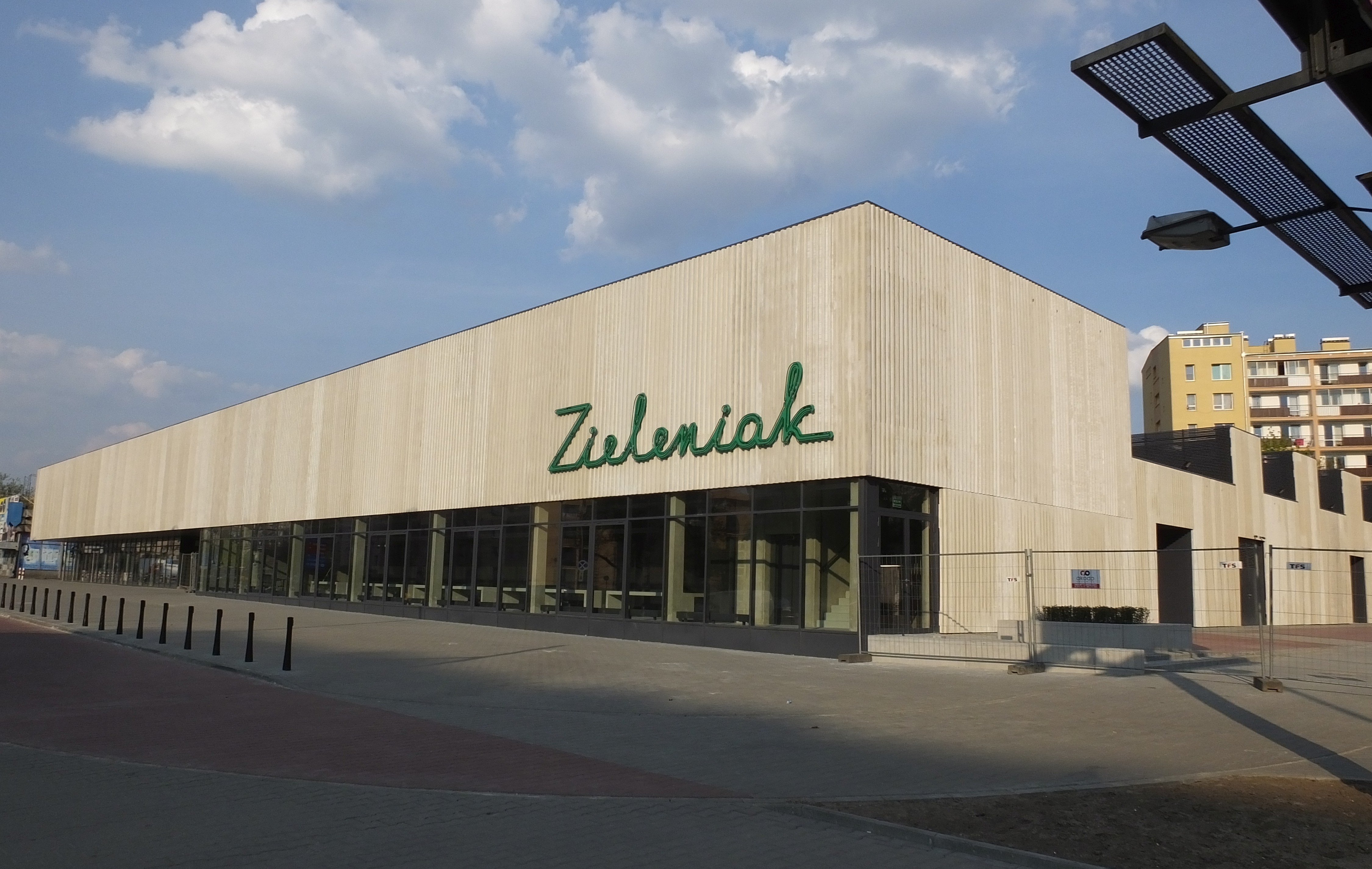 Hala Zieleniaka w Warszawie na początku 2015 r.